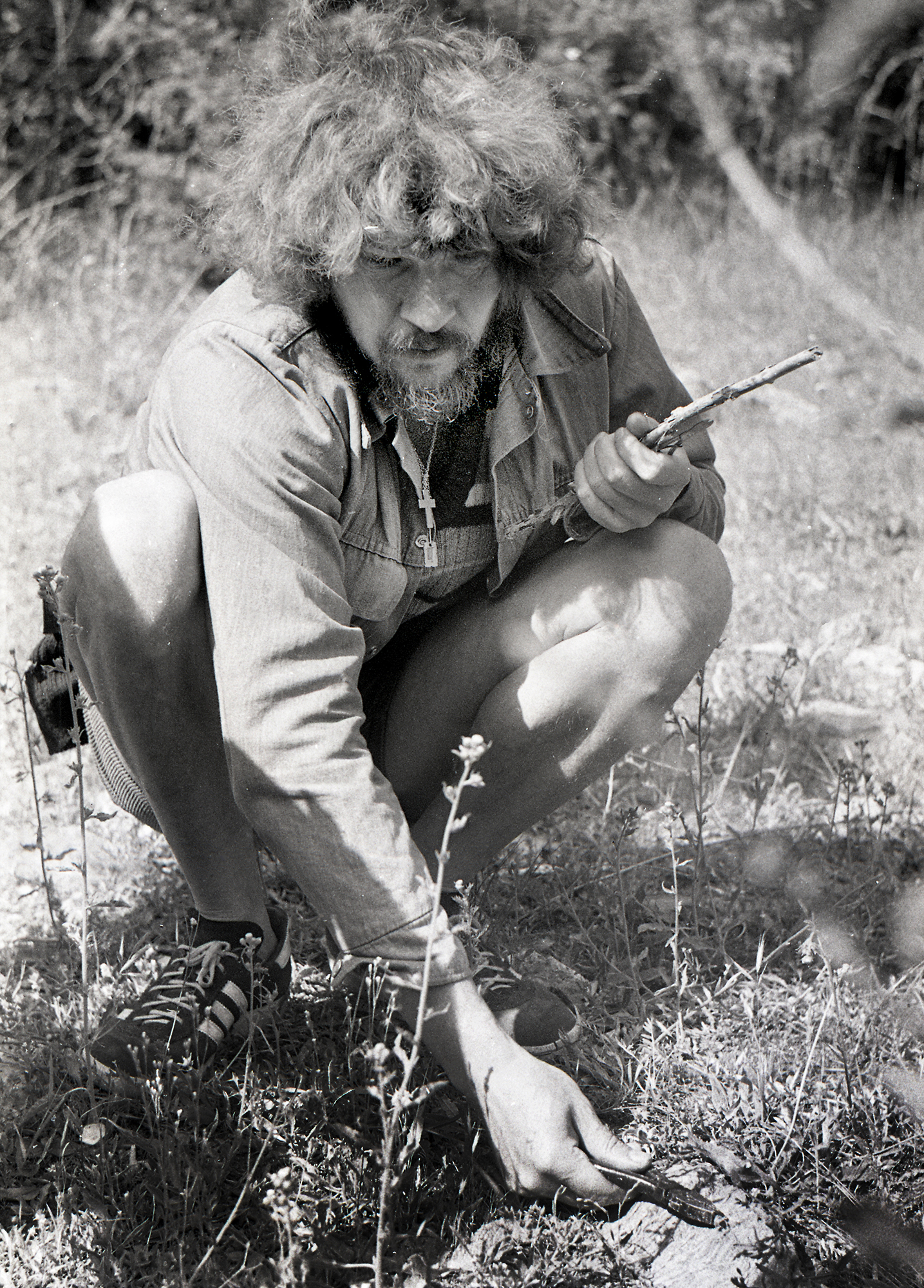 Vigala Sass (Aleksander Heintalu) 1982. aastal mägedes skorpioni mürki kogumas.